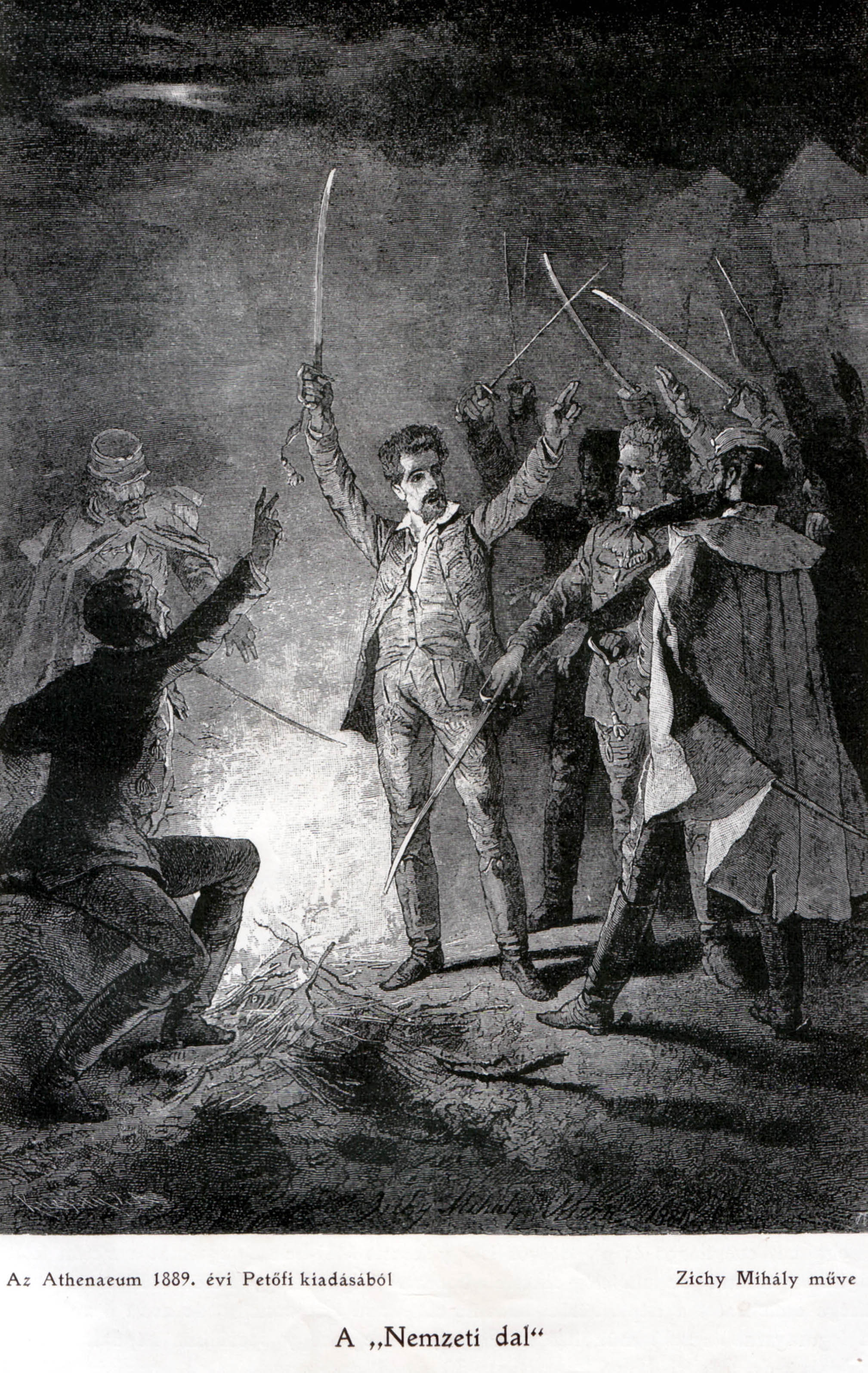 Nemzeti dal (1848. március 15.) - Zichy Mihály rajza.